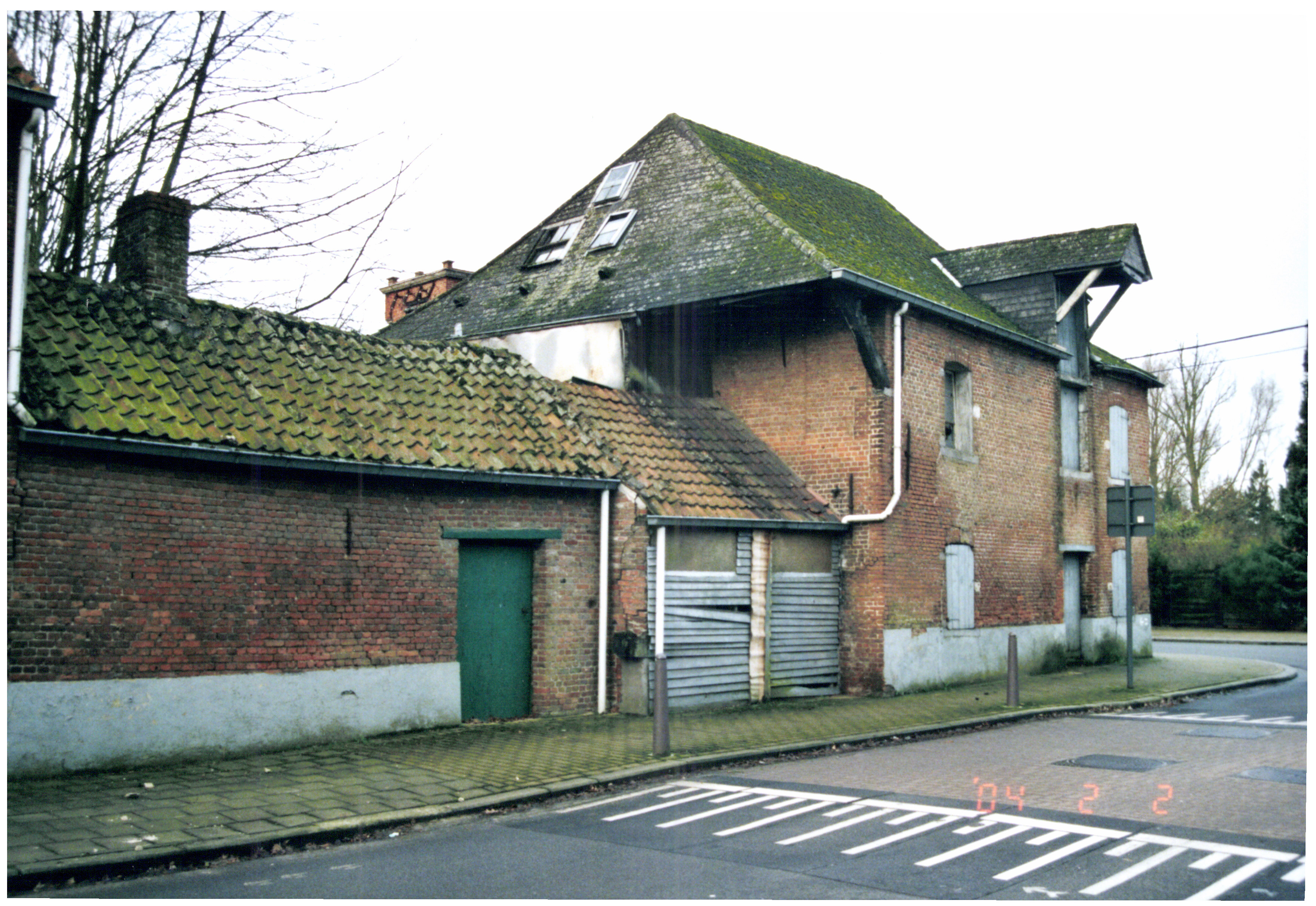 Maalderij (voormalige Watermolen) This is a possible Onroerend Erfgoed: Find the monument in the Monuments database: Eindhoutseweg 37 in Geel All Onroerend Erfgoed in Geel Is this Onroerend Erfgoed? Yes No More images to work at in Category:Possible onroerend erfgoed.